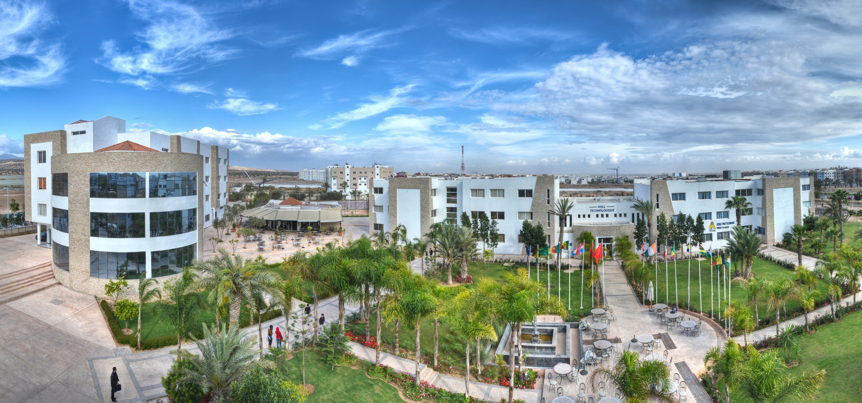 Universiapolis: L'Université Internationale d'Agadir est une université privée autorisée par l'Etat . Université ,forte de ses 26 ans d'expérience dans l'enseignement nord-américain.